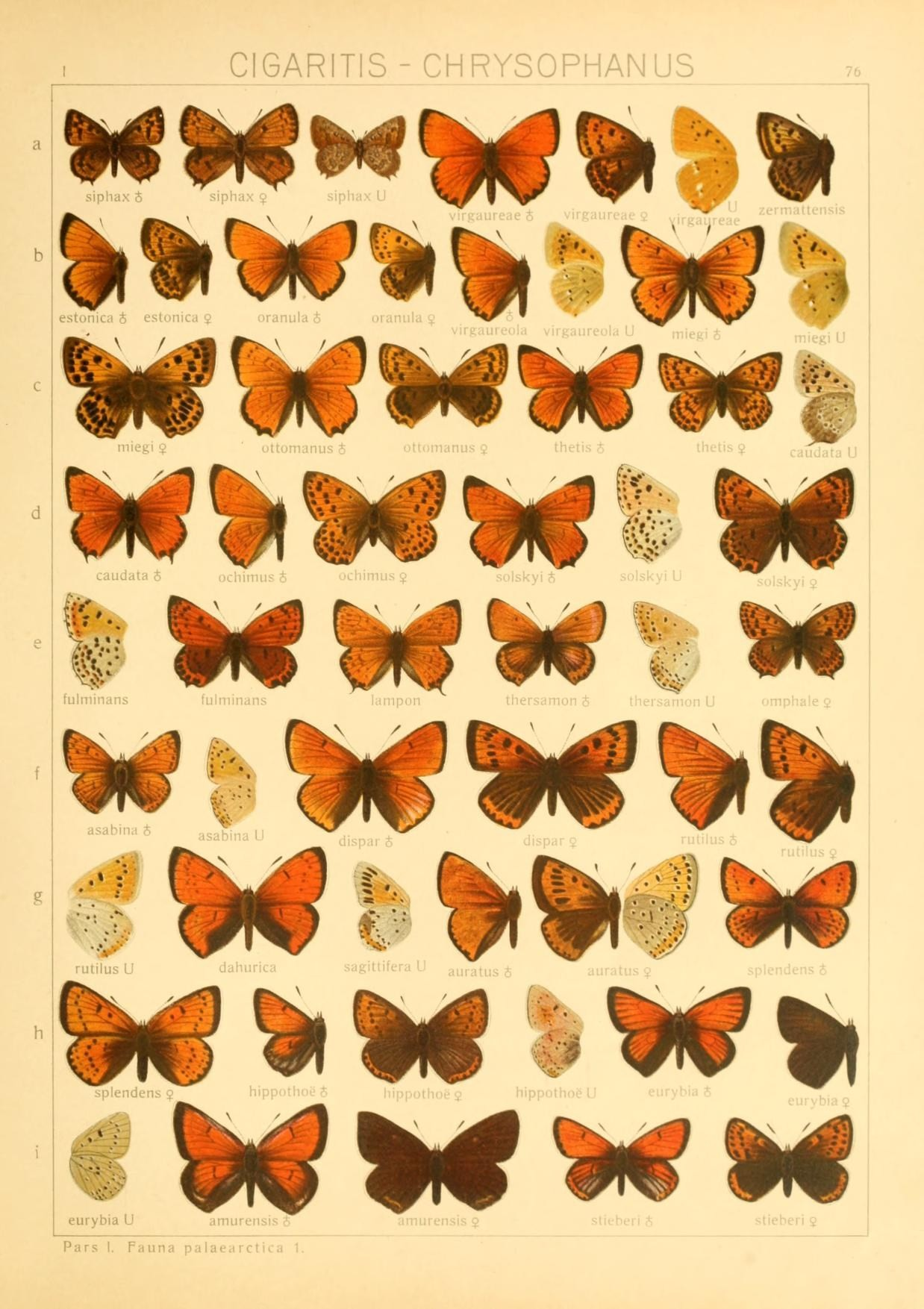 CIGARITIS-CHRYSC m: CS- ?v^,'.5 caudata 5 ochimus i uchimus $ wV f^ f eurybia U Pars I. Fauna palaeiirctiia 1.